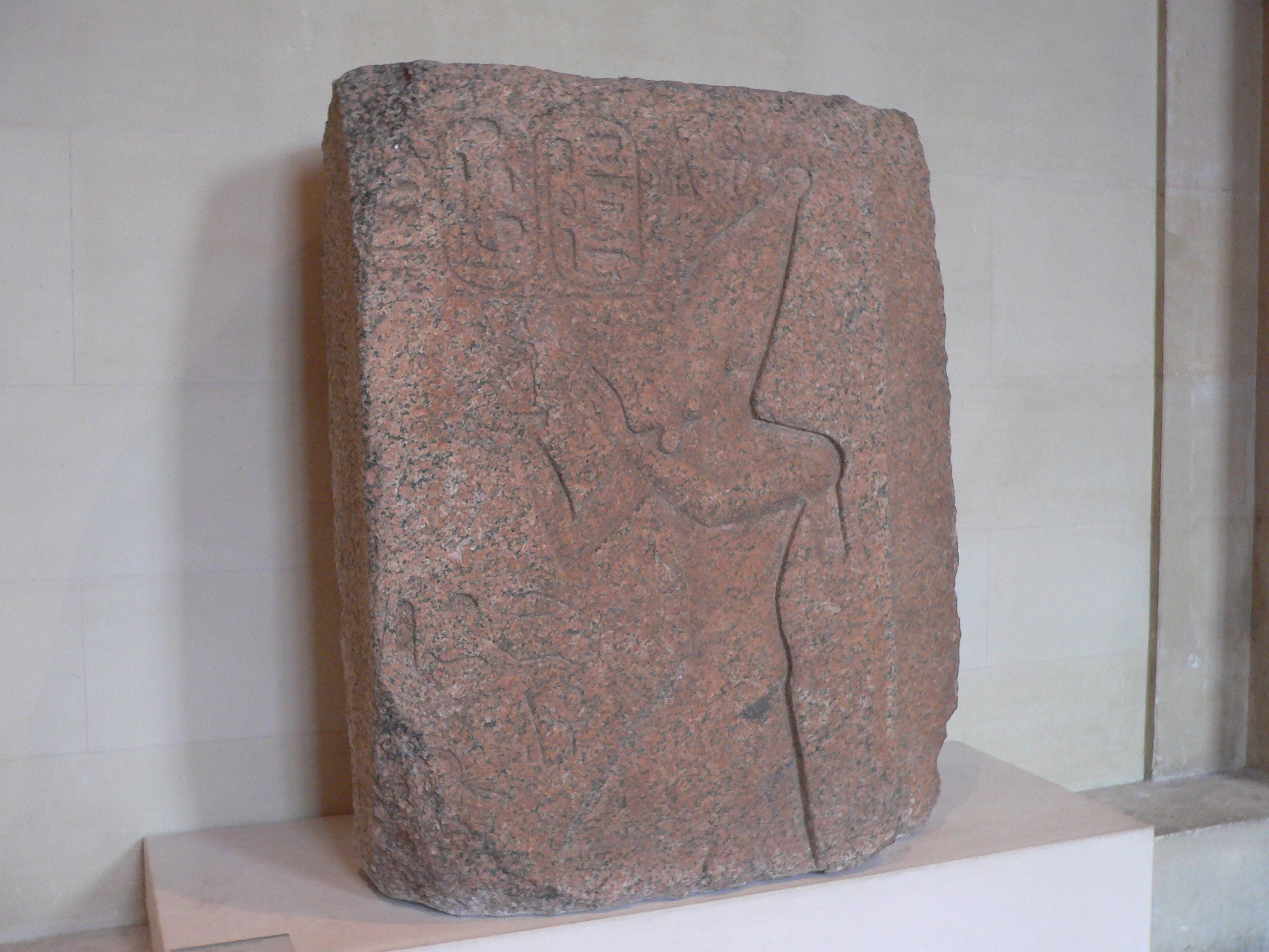 Le roi Osorkon Ier offre une image de la déesse Maât 924 - 889 av. J.-C. (22e dynastie) louvre.fr